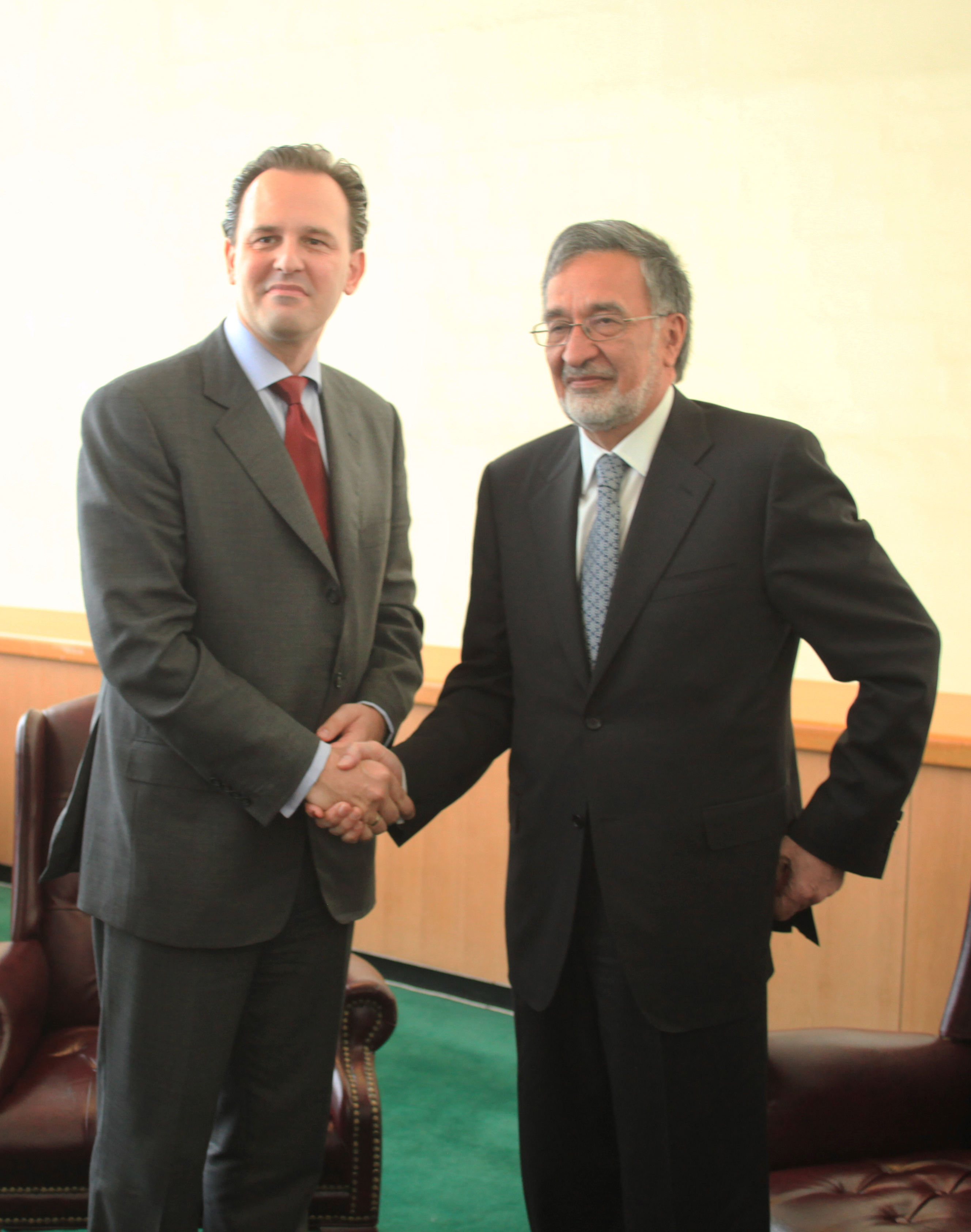 Συνάντηση ΥΠΕΞ κ. Δ. Δρούτσα με ΥΠΕΞ Αφγανιστάν Dr.Zalmai.Rassoul. (Νέα Υόρκη 27.09.10)